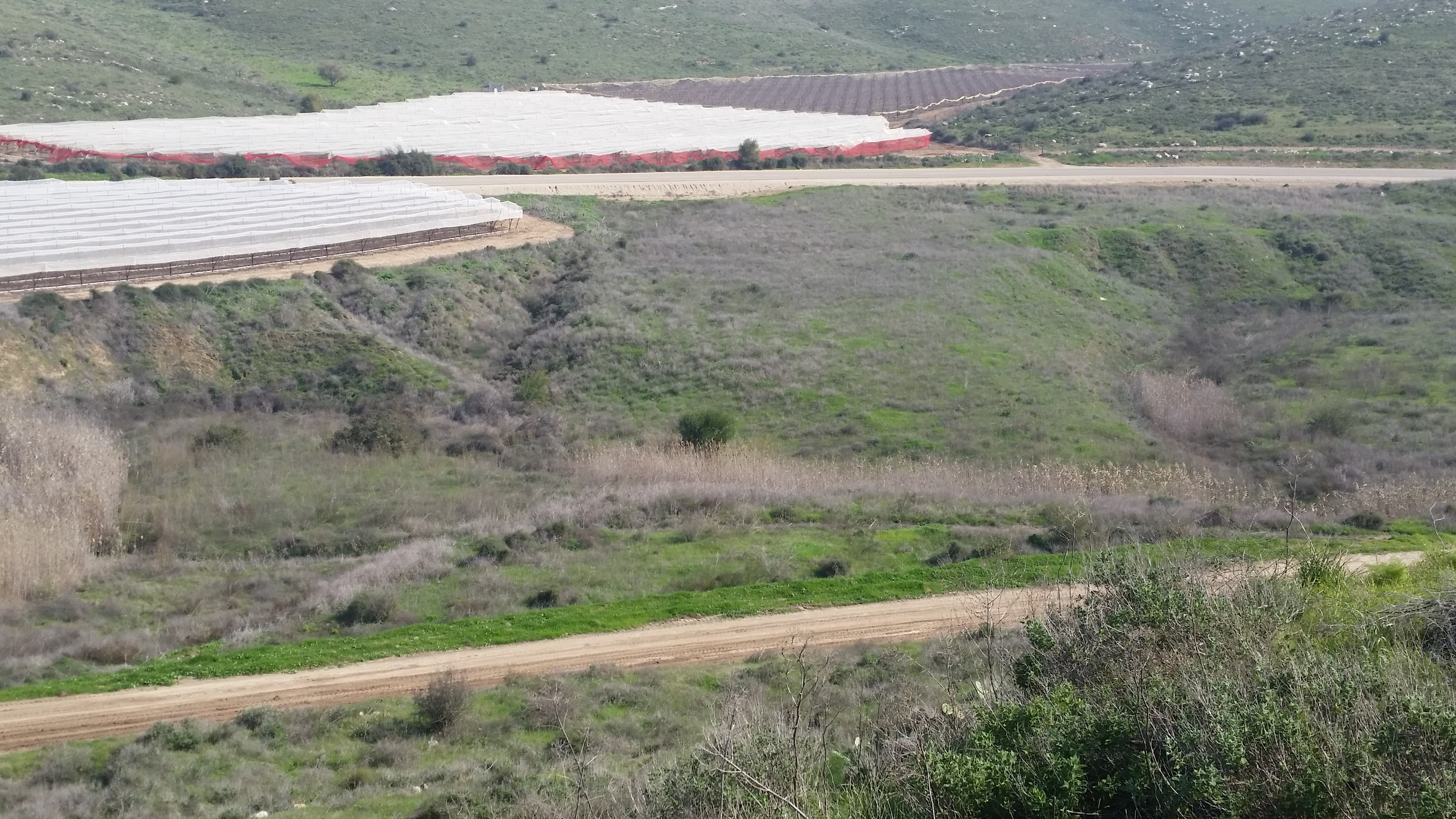 נחל לכיש למרגלות תל לכיש. תצפית מתל לכיש.